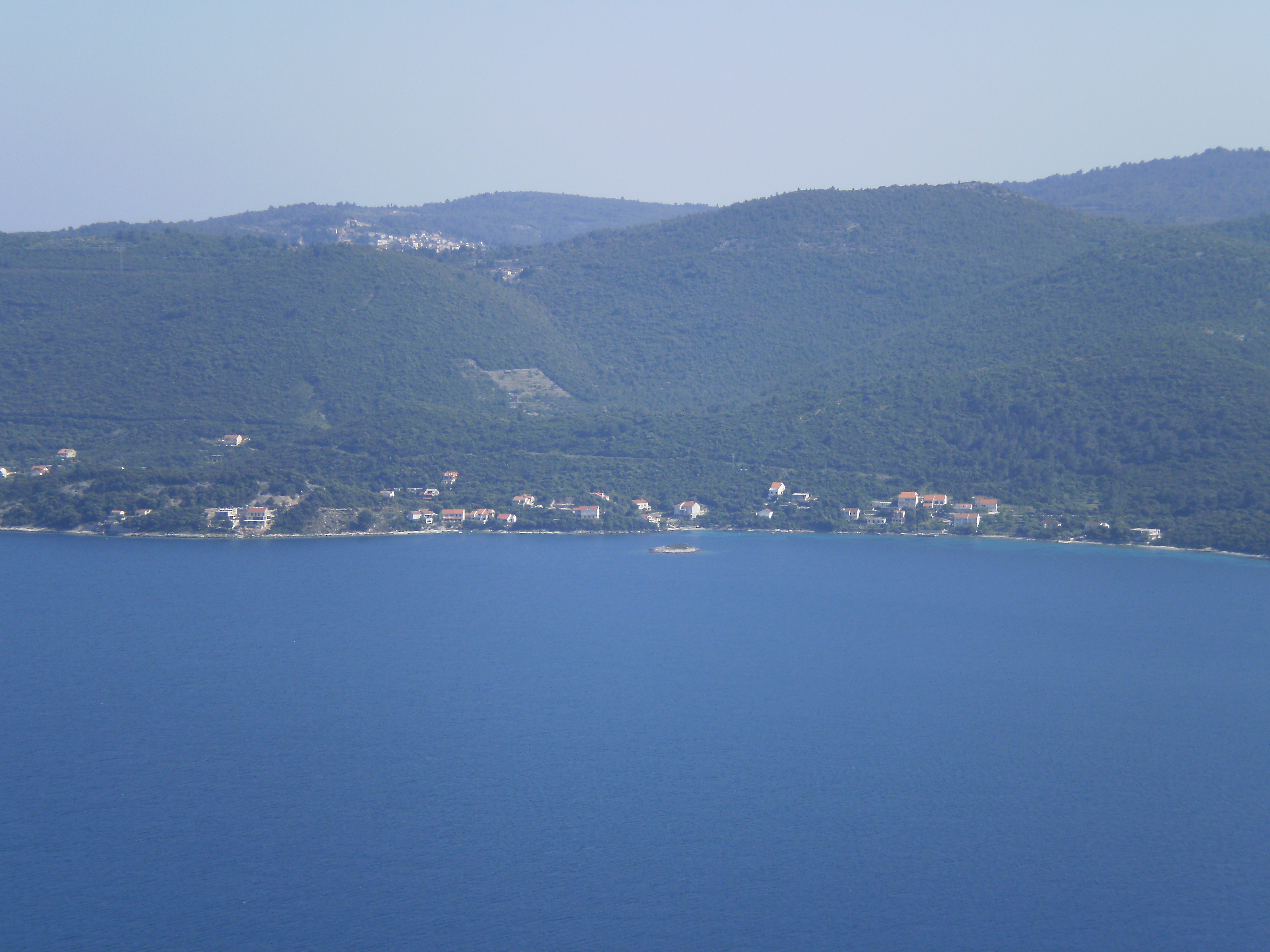 Žrnovska Banja i Mulić